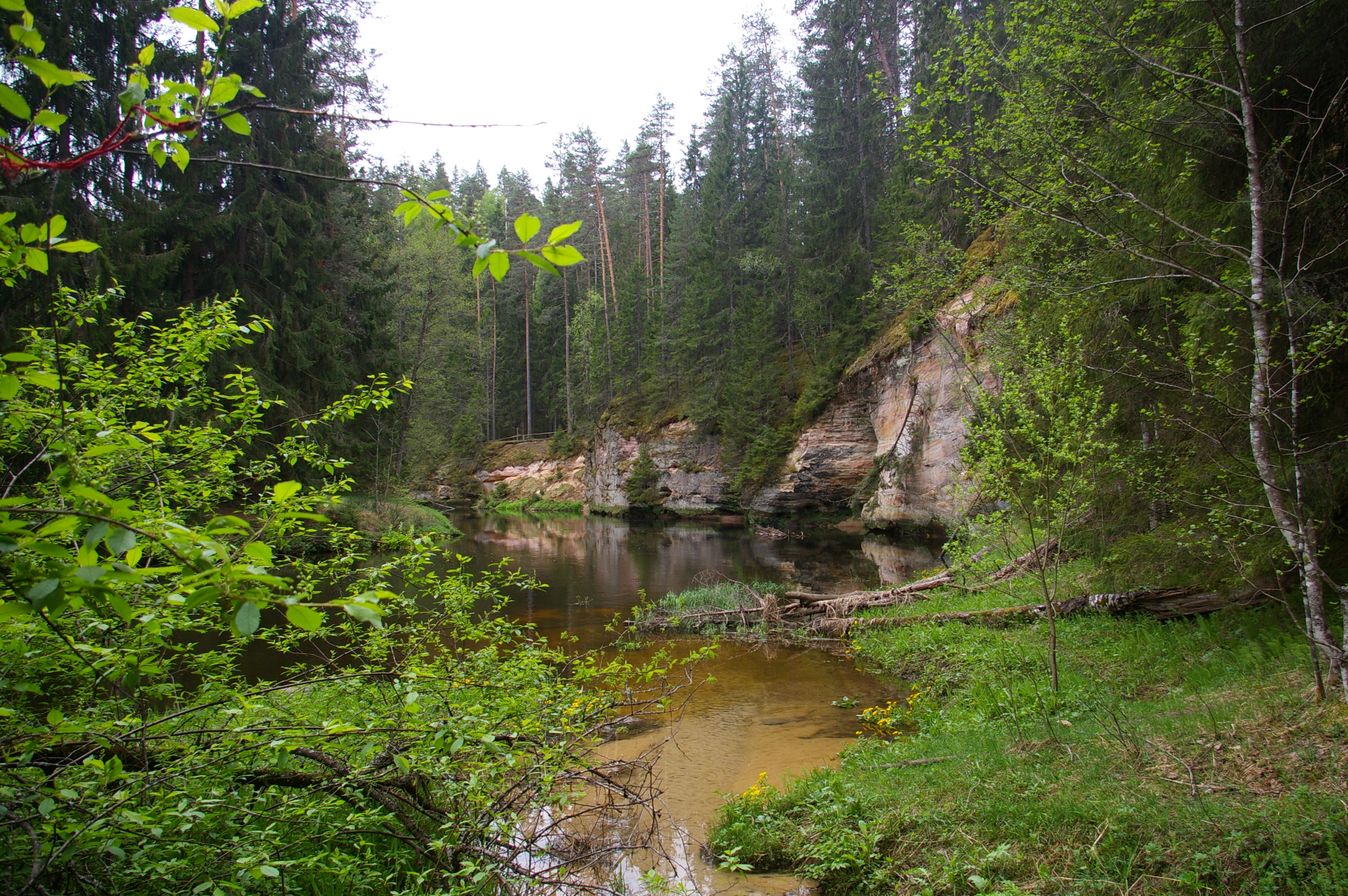 Väike Taevaskoda, mille müüris paremal on Neitsikoobas ja vahetult ees voolab ojanire, mis tuleb pildistaja selja tagant Emalättest. Ees vasakul veel õitsev toomingapõõsas.